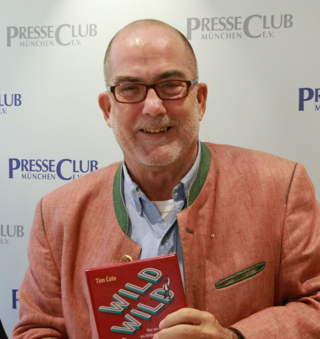 Tim Cole, deutsch-amerikanischer Internet-Publizist, Kolumnist und Autor. Hier am 5. November 2018 im Internationalen Münchner PresseClub. Titel des Werks: "Tim Cole (Nov. 2018)"